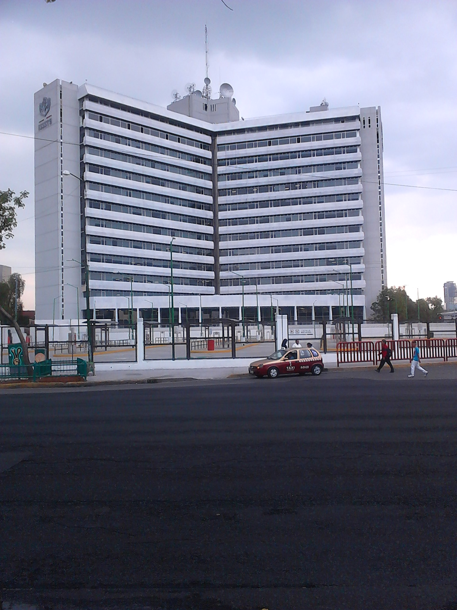 Edificio del ISSSTE, antes de Ferrocarriles Nacioales